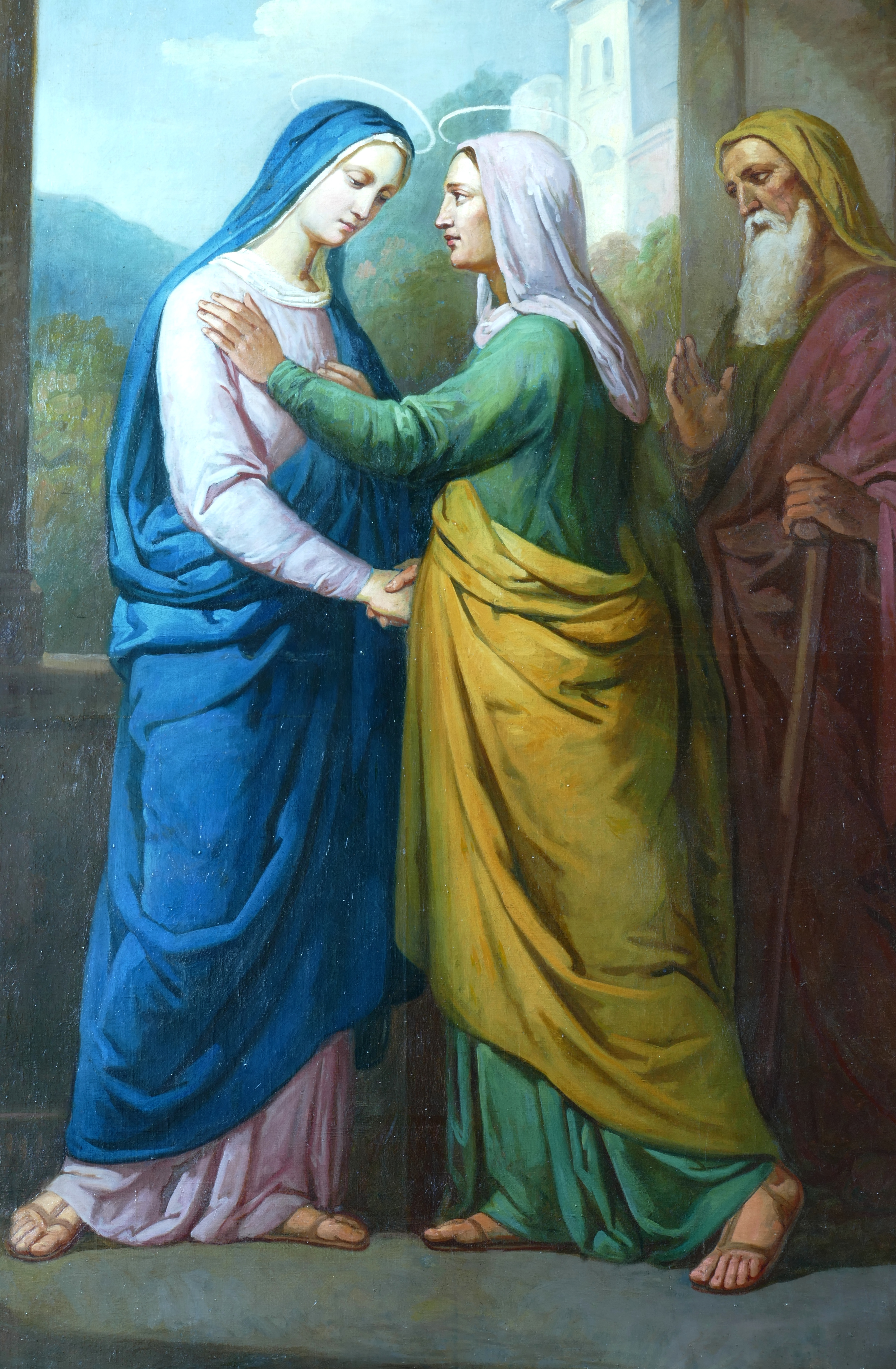 Alsace, Bas-Rhin, Rountzenheim, Église simultanée Sainte-Croix (PA00084919, IA00124039). Tableau de l'autel secondaire "Visitation" (Inconnu, huile sur toile, XIXe)